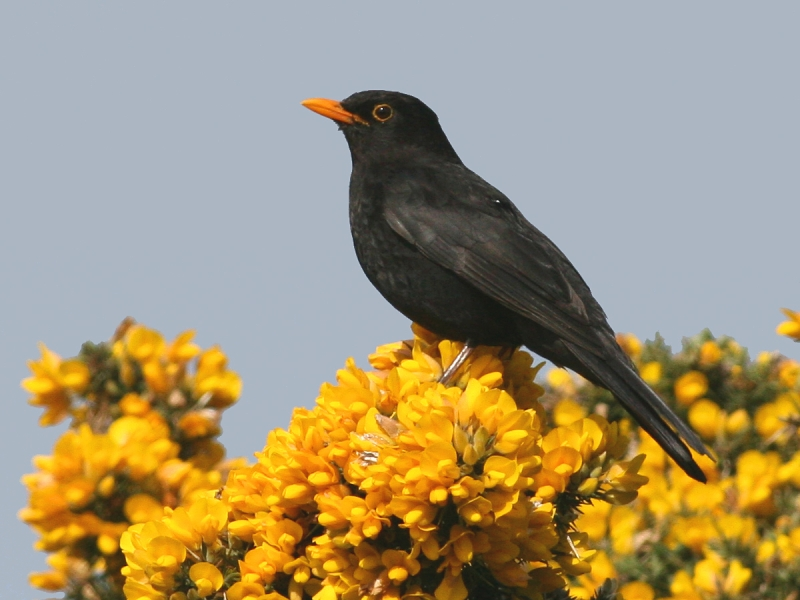 Blackbird (Turdus merula)